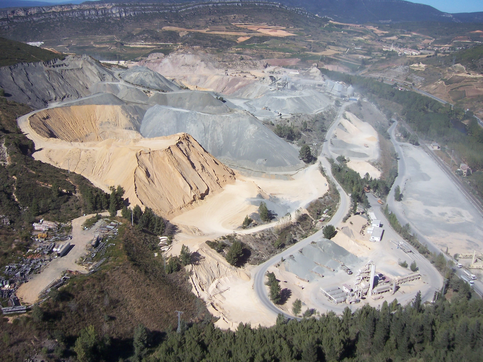 Cantera de caliza en Haro - La Rioja